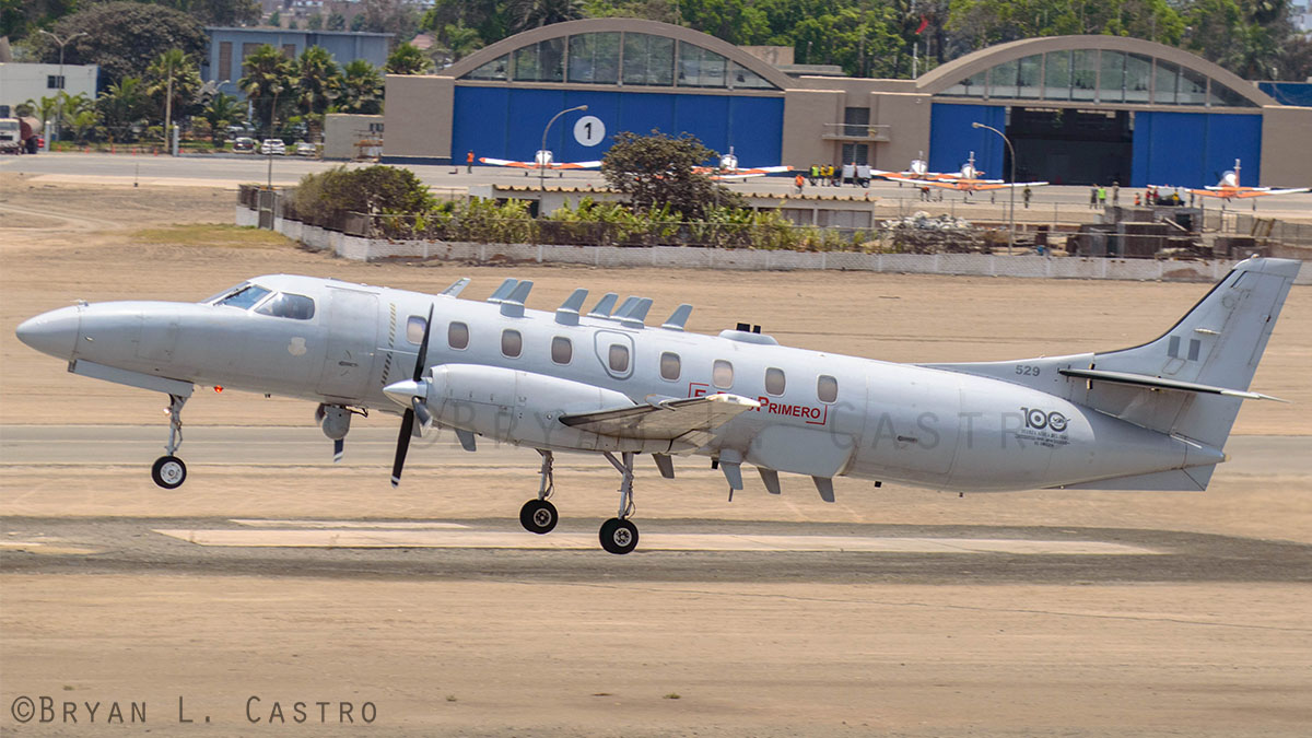 Fairchild C-26BM Pegasus despegando de la Base Aerea Las Palmas en Lima. Fuerza Aérea del Perú.